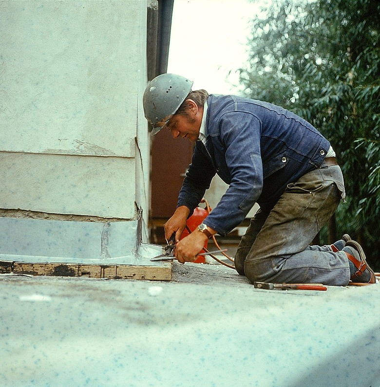 Original image description from the Deutsche Fotothek Dachdecker, Schlachthof